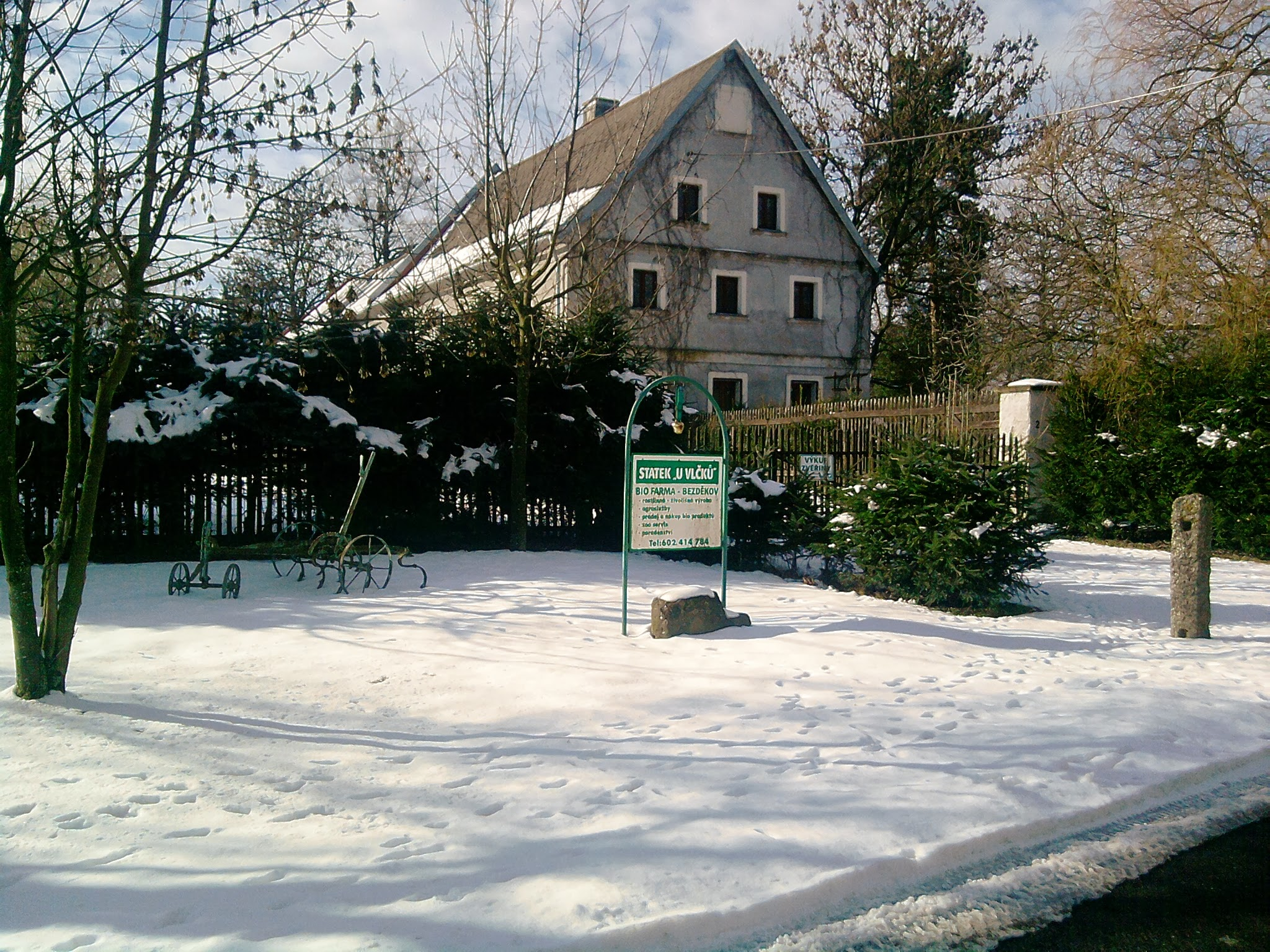 Bezděkov statek U Vlčků